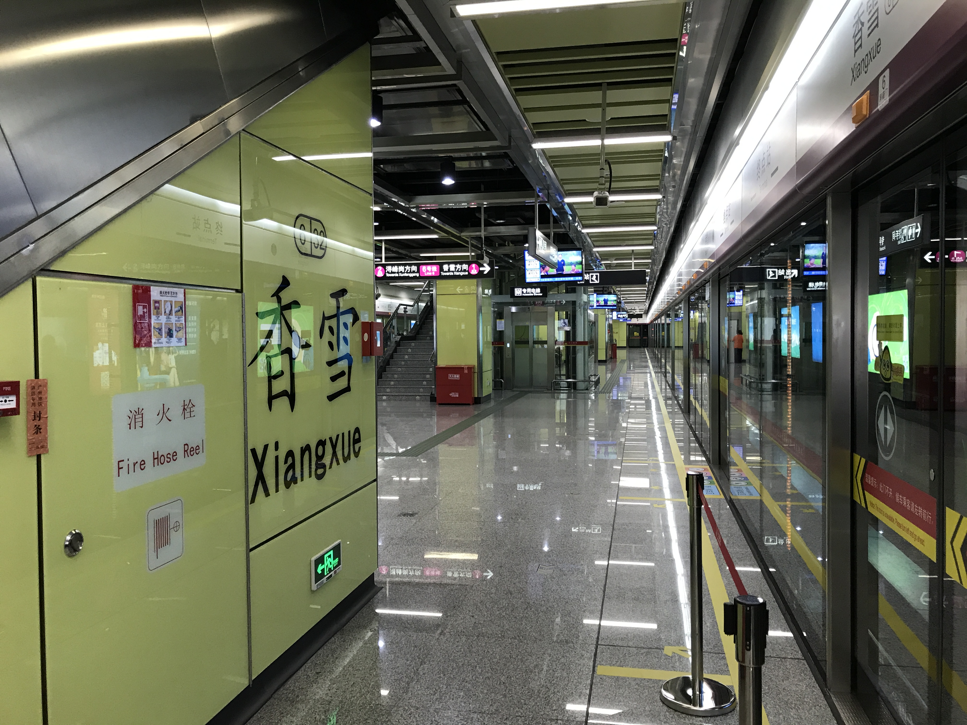 广州地铁香雪站